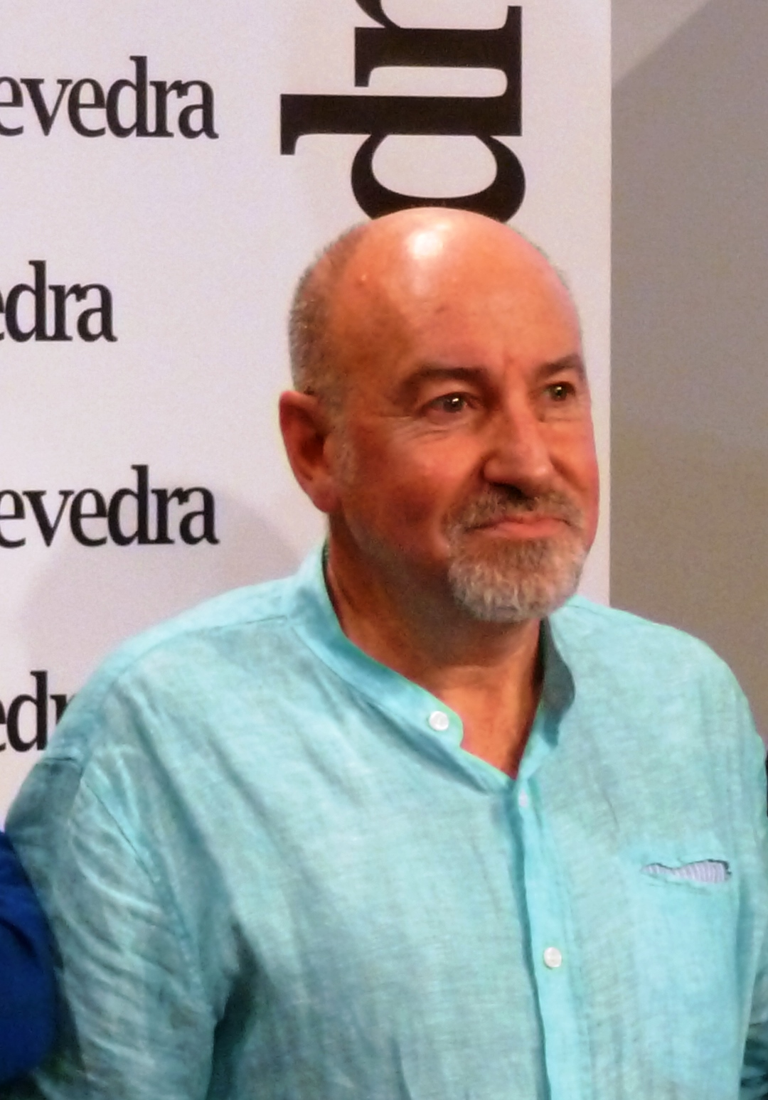 Xosé Ballesteros na Casa das Campás de Pontevedra o 23/10/2018